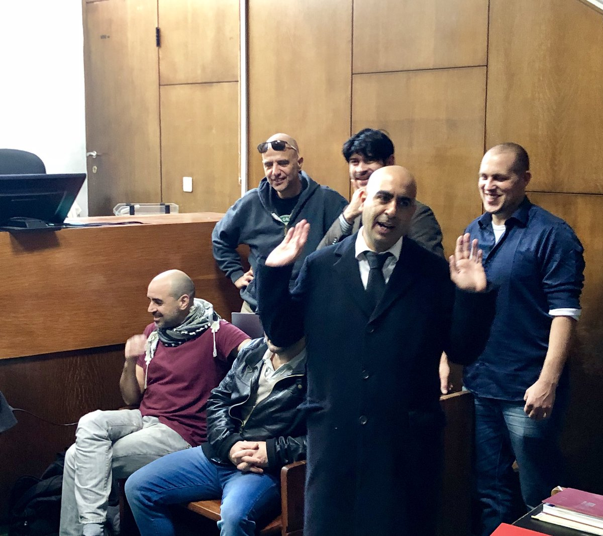 הנאשמים בפעילות נגד ראשי המערכת הבנקאית